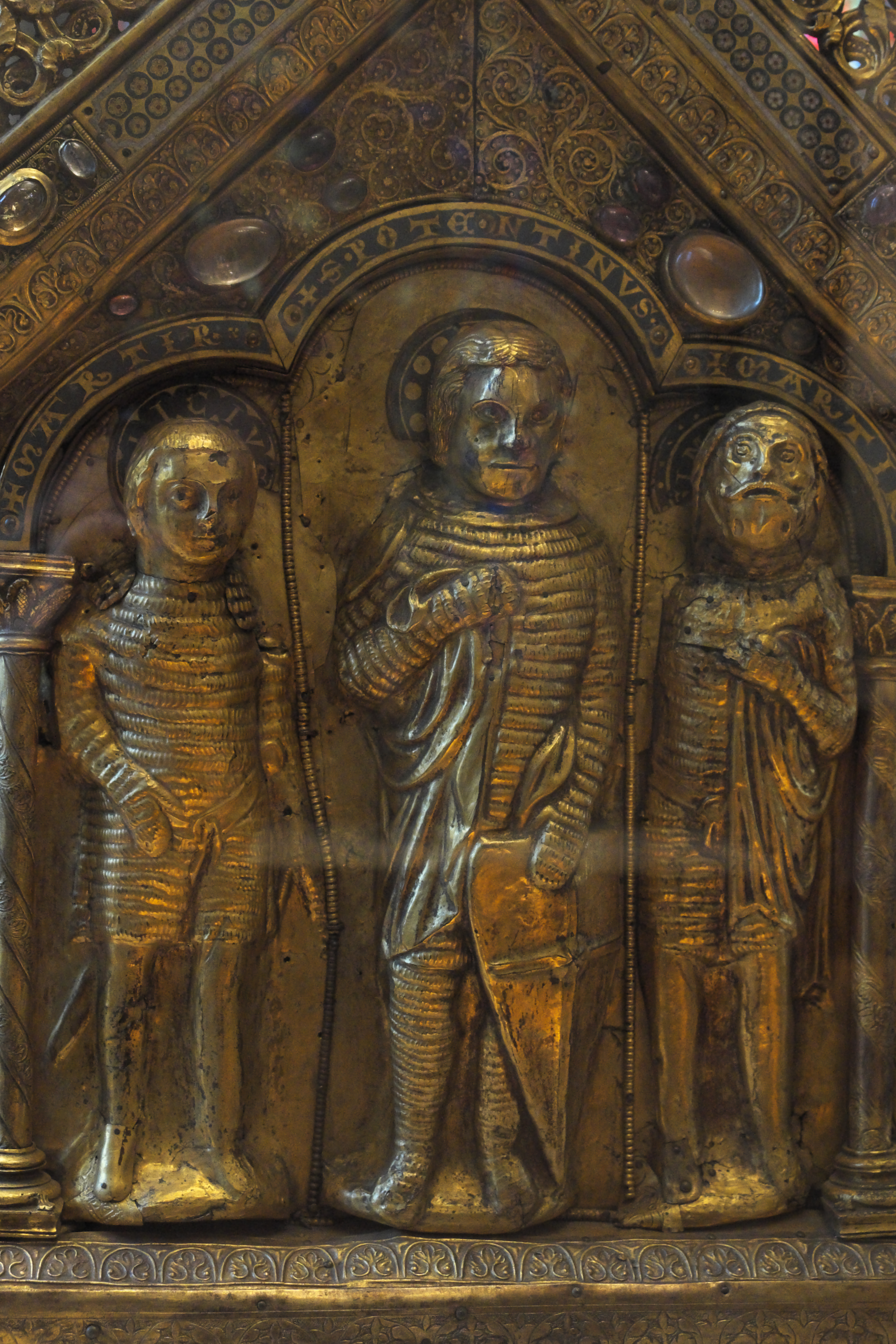 Potentinusschrein aus dem ehemaligen Prämonstratenserkloster Steinfeld in Steinfeld im Kreis Euskirchen (Nordrhein-Westfalen/Deutschland), heute im Musée du Louvre in Paris (Frankreich), Goldschmiedearbeit, um 1220/40 in der Gegend von Trier geschaffen; Darstellung: Potentinus und seine Söhne Felicius und Simplicius